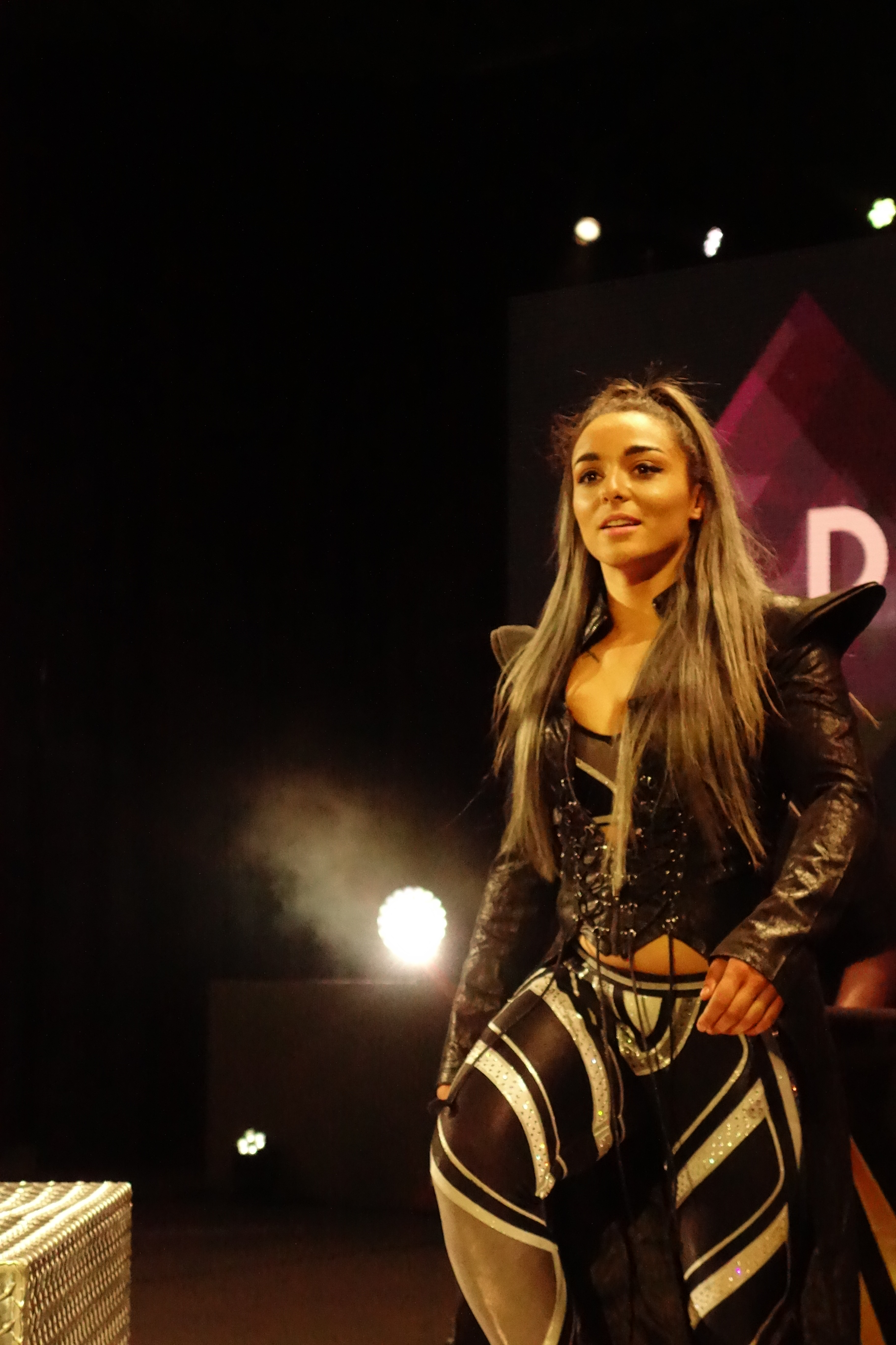 Deonna Purazzo entrant sur le ring en 2019.